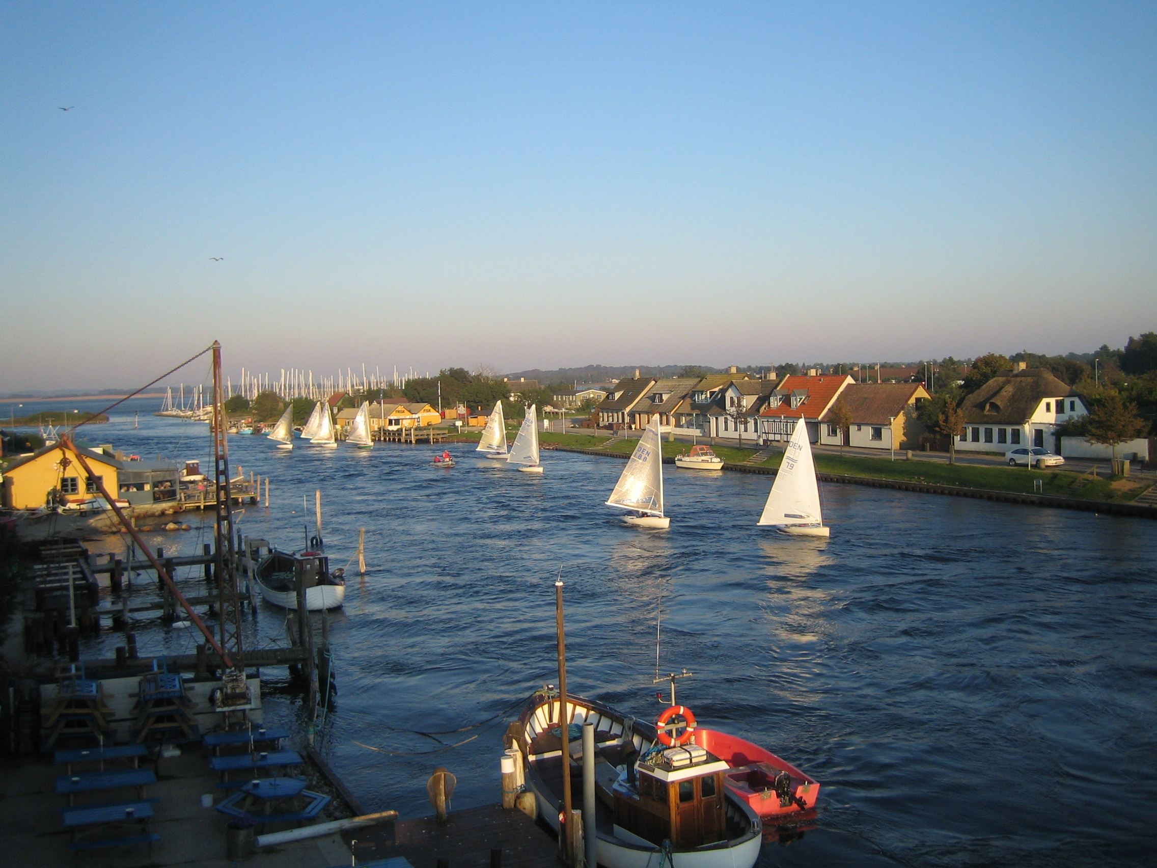 Finn dinghies in Karrebæksminde, Denmark other version: Image:Finn_dinghies_02.jpg